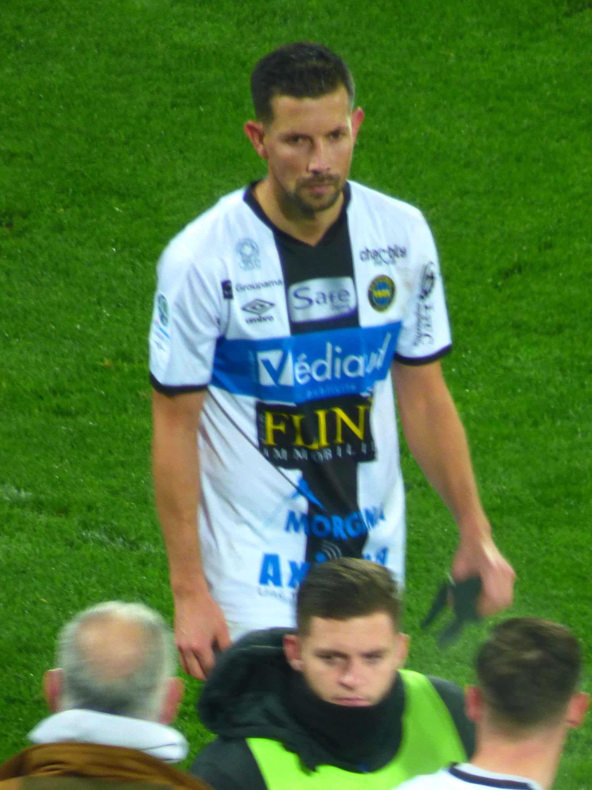 John Popelard lors du match Lens - Chambly, comptant pour la dix-septième journée du championnat de France de football de Ligue 2 2019-2020, le 3 décembre 2019.